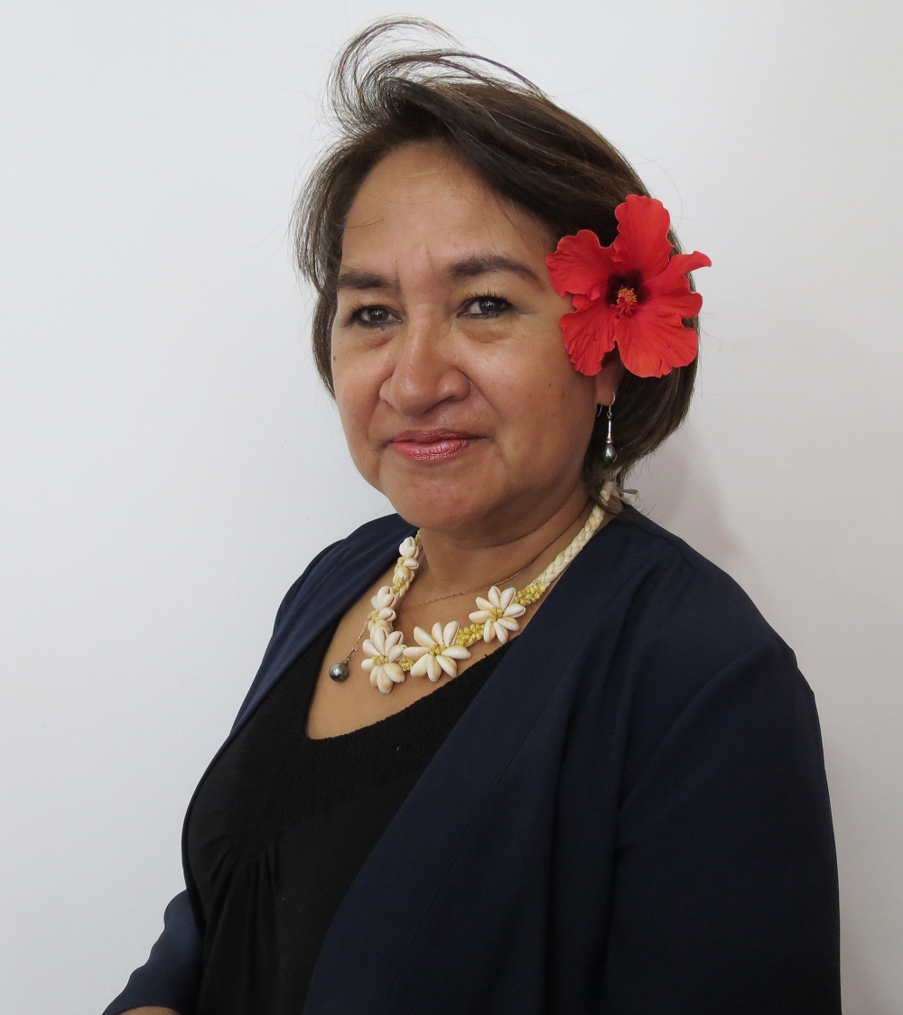 Carolina Hotu Hey, gobernadora de la provincia Isla de Pascua